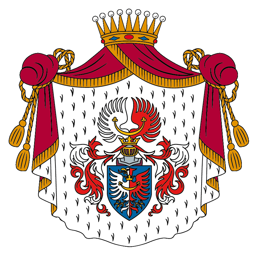 Erb pánů z Kolowrat